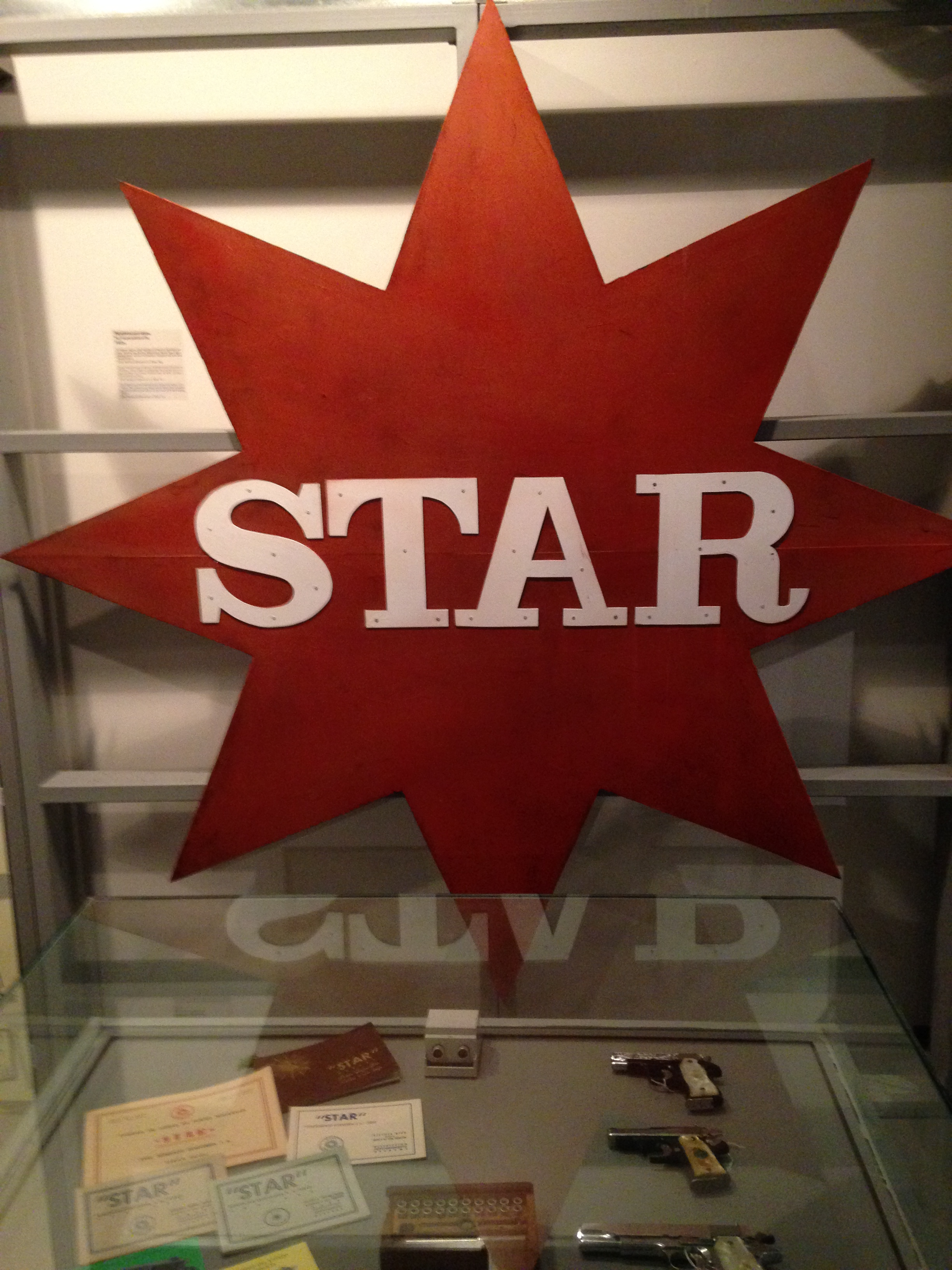 Museo de la Industria Armera de Éibar. Logotipo de la fábrica de armas STAR Bonifacio Echeverría SA